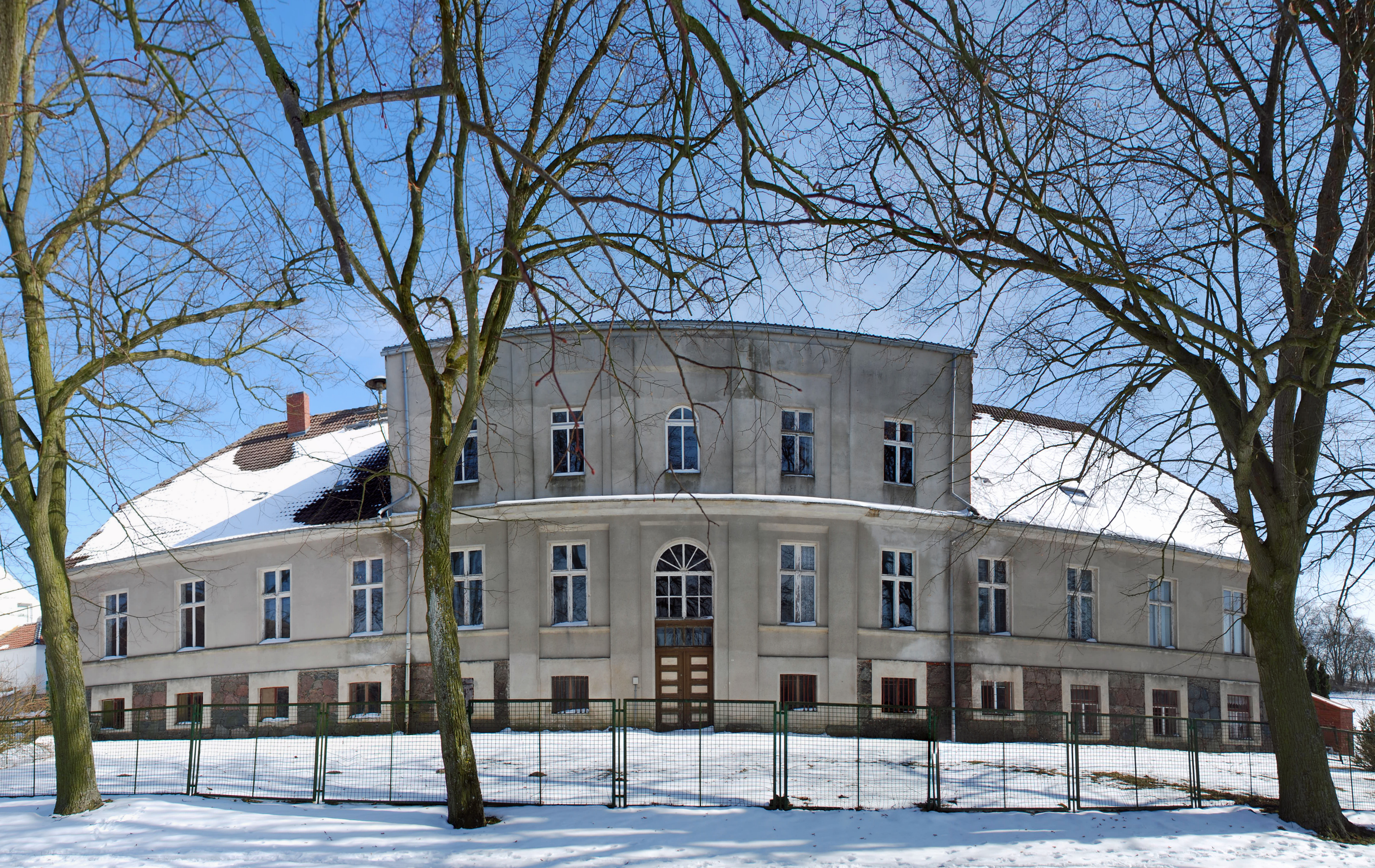 Gebäude und Denkmal in der Uckermark. (Altkreis Angermünde)